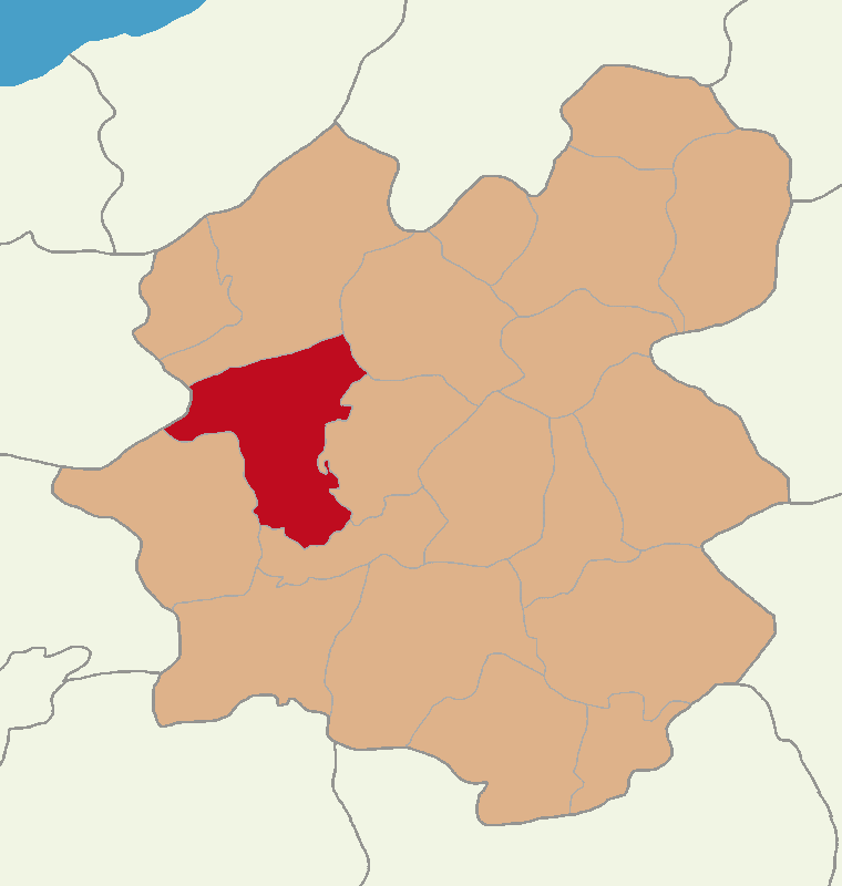 Aziziye ilçesinin konumu